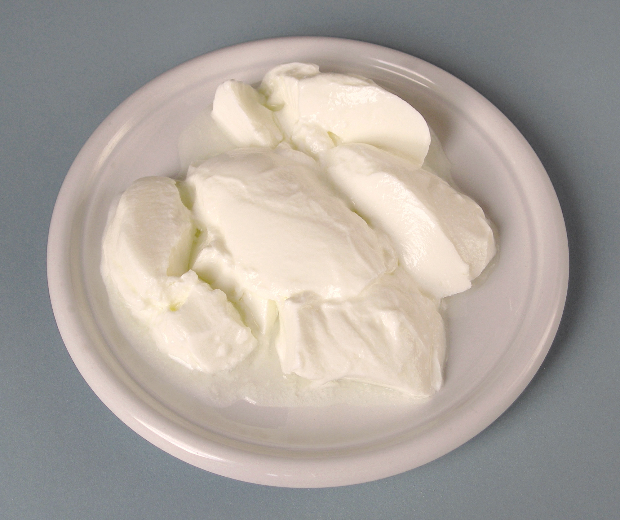 Turkish yogurt